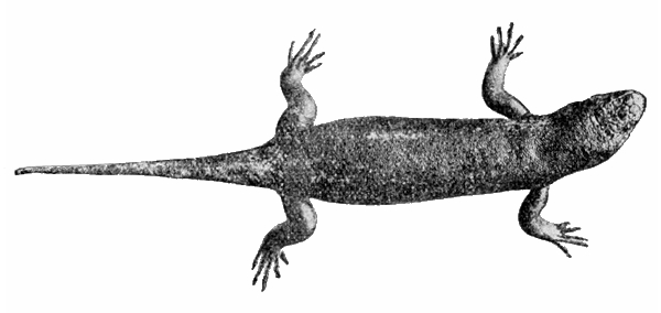 The extinct Cape Verde Giant Skink (Chioninia coctei) Depiction from 'C. França: Le Professeur Barbosa du Bocage. Boletim da Sociedade Portuguesa de Ciências Naturais, Vol. 2, pp. 141-194, 1908'